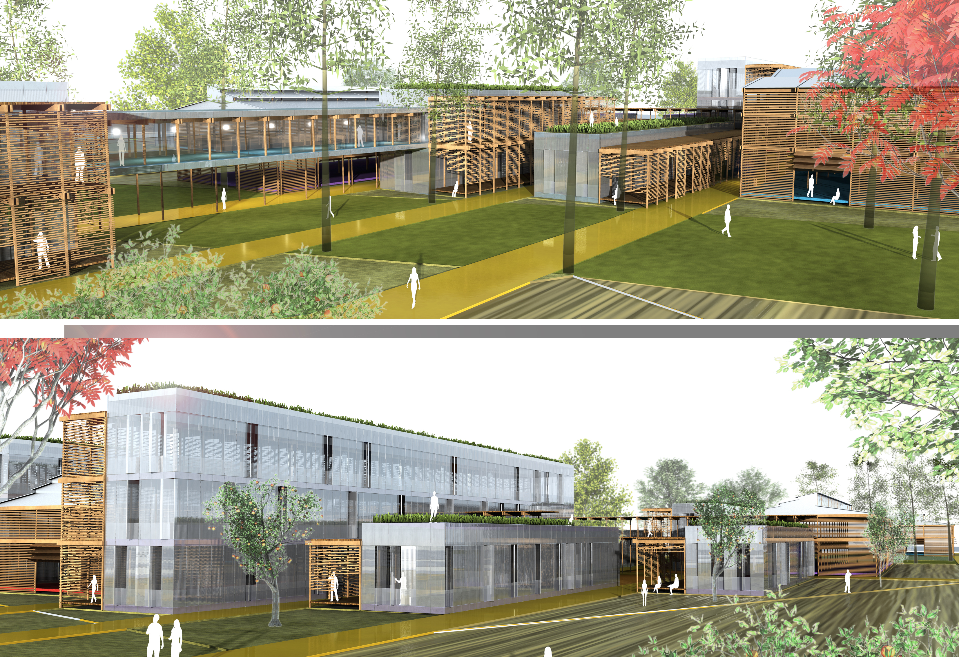 מבטים